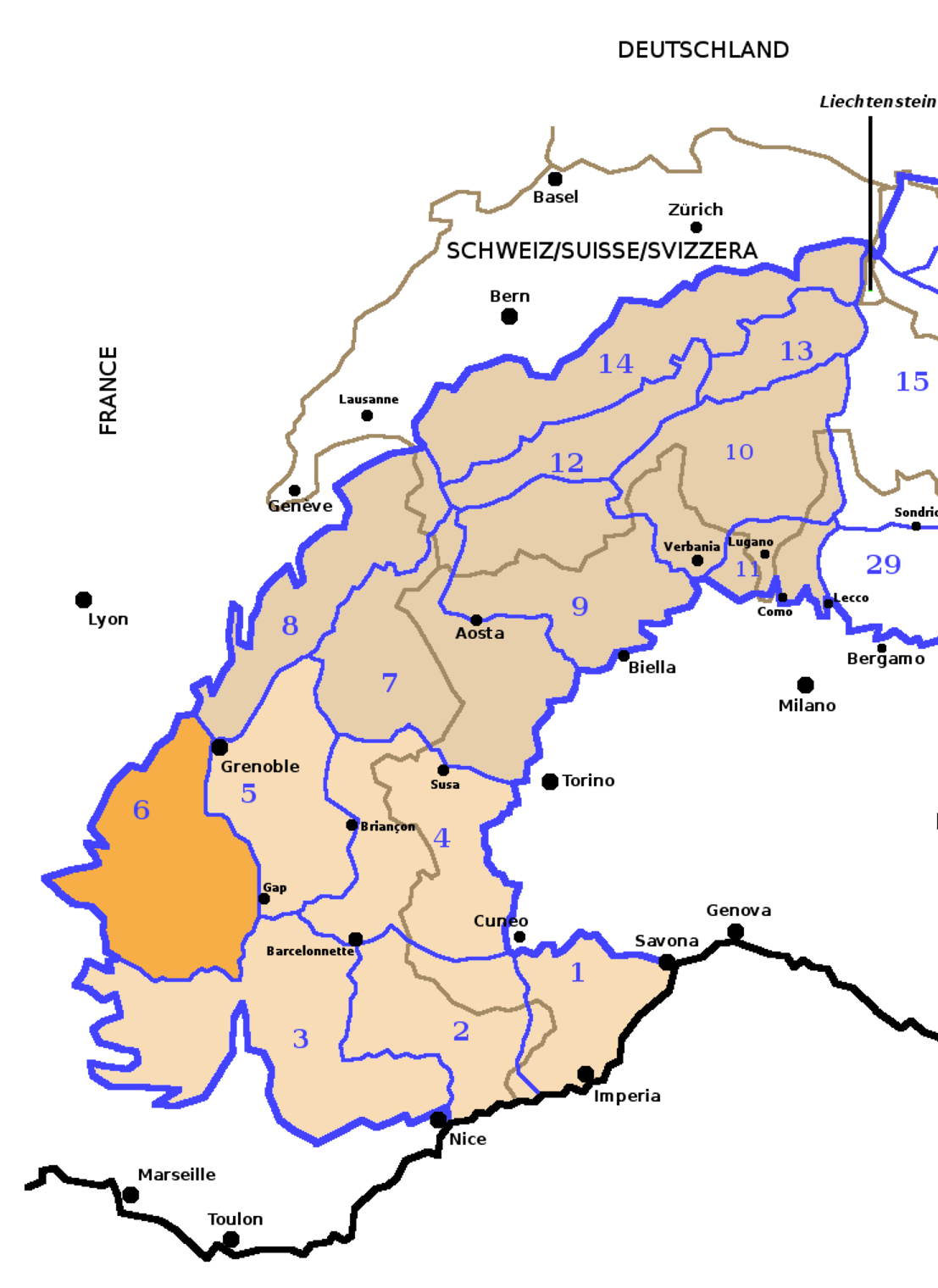 Alpi Occidentali secondo la SOIUSA con evidenziate le Prealpi del Delfinato